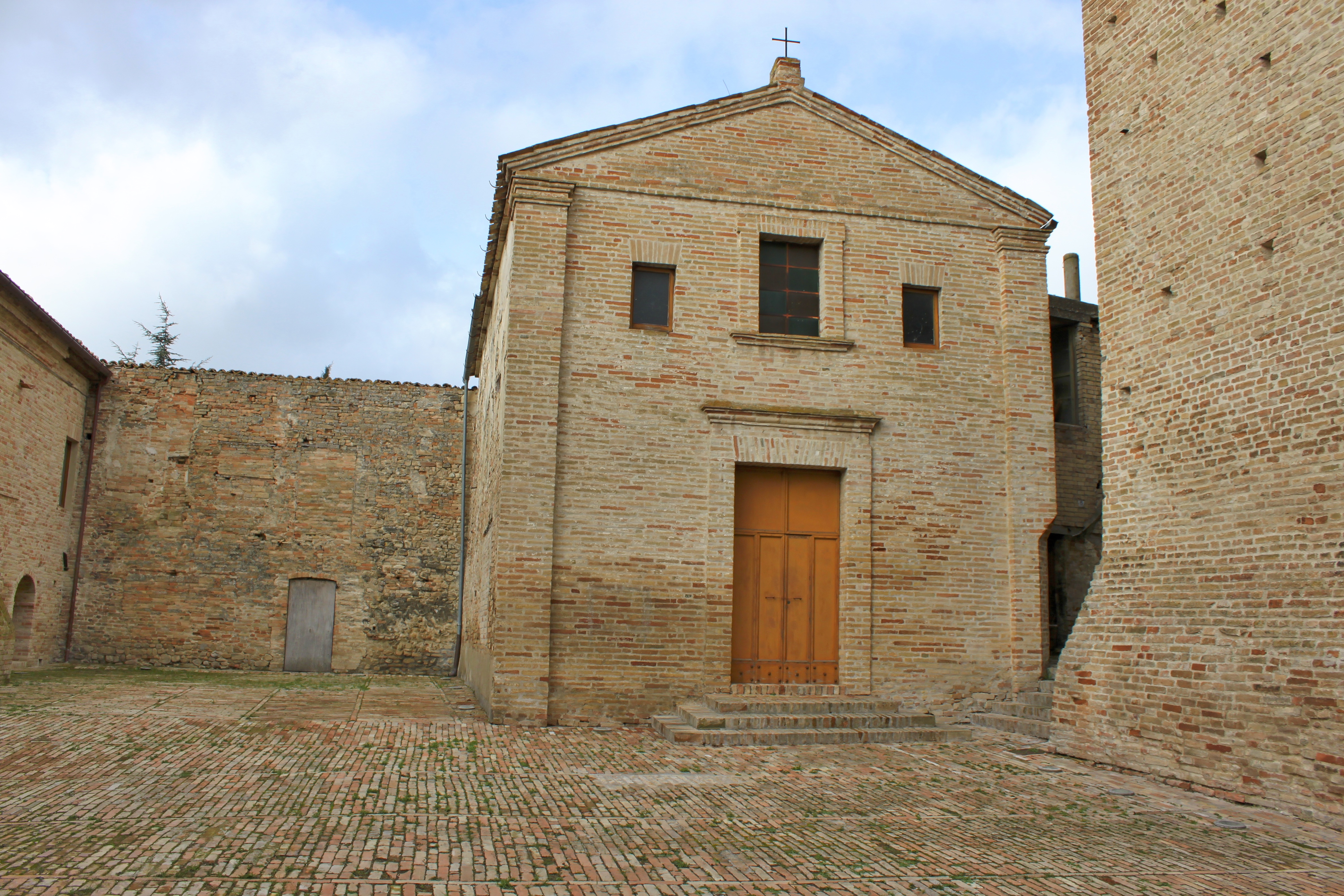 La Chiesa di San Pietro si trova all’interno del Castello di Rocca Monte Varmine, oggi non visitabile. Qui è presente la copia di una crocifissione di Vittore Crivelli. L'originale si trova presso il Museo Diocesano di Fermo.